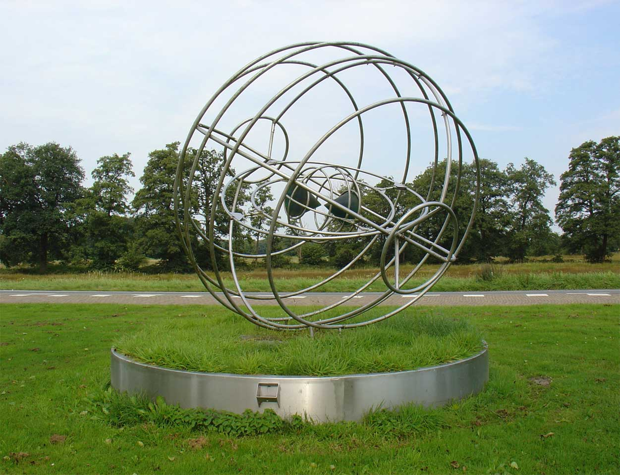 "Diabolo" door Michiel van Bakel - Deurze